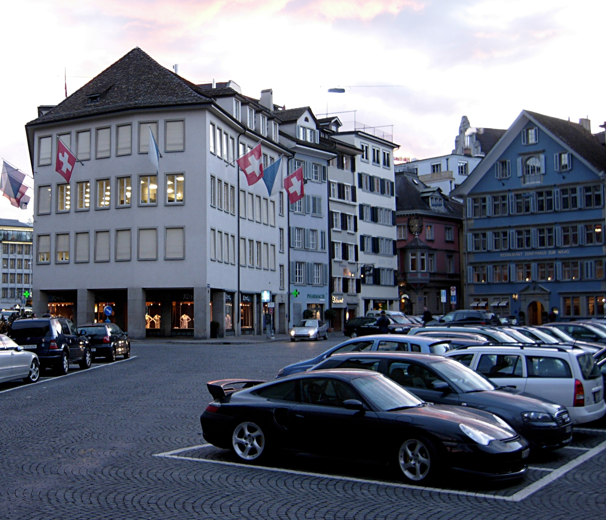 The Fraumünsterplatz in Zürich.